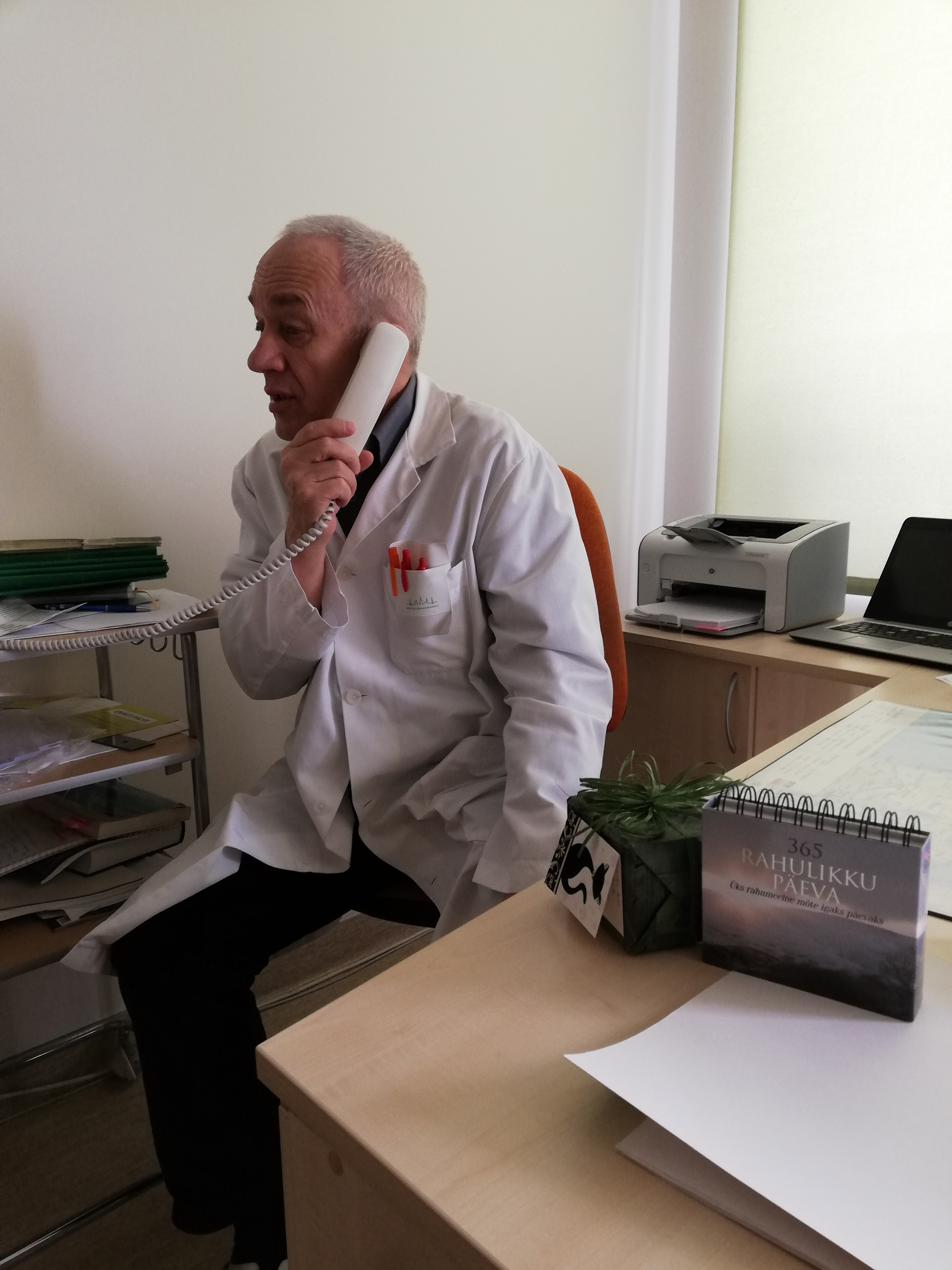 Psühhiaater Jüri Ennet Järve Hooldushaiglas.